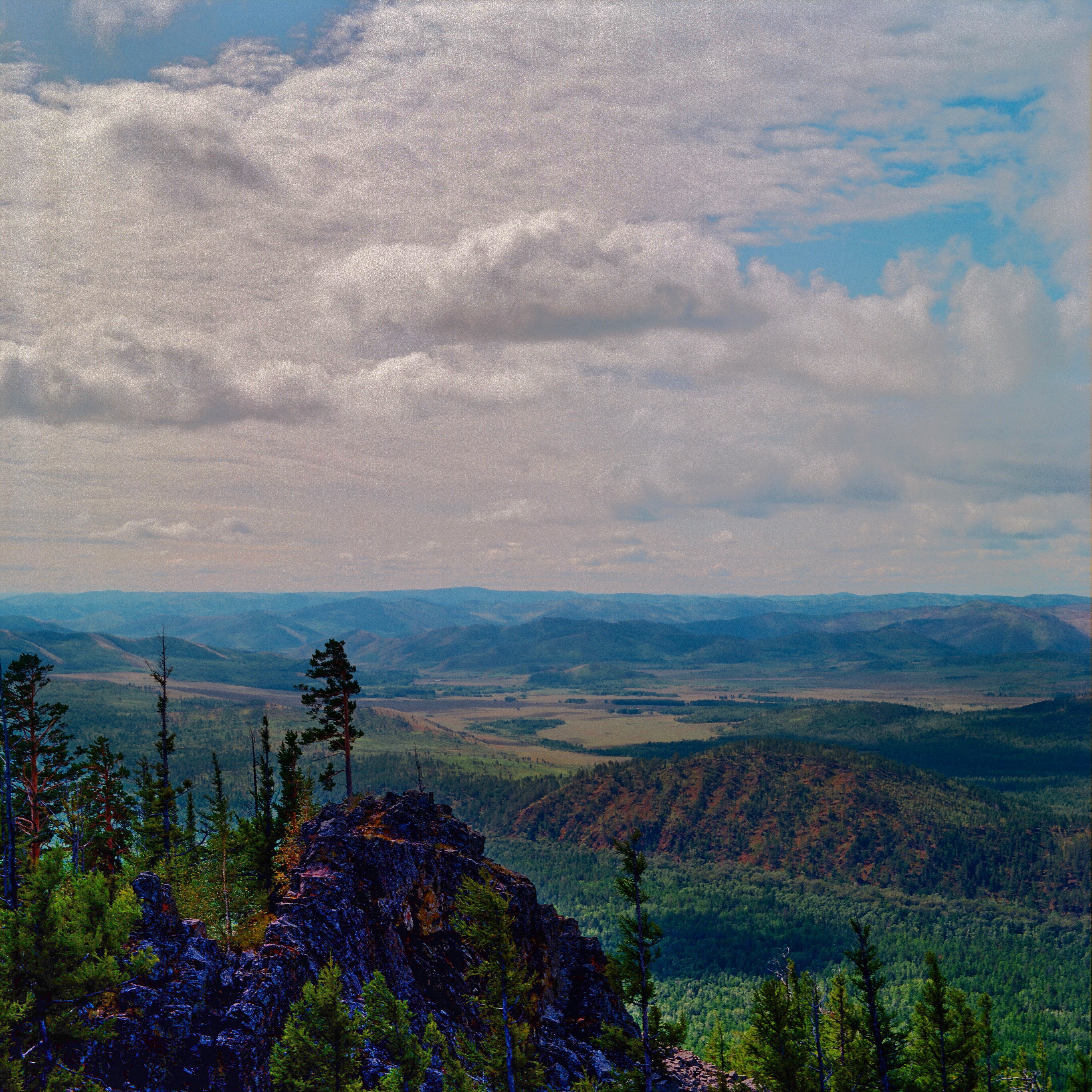 Алханай: Дульдургинский район, This image is related to the protected area of Russia number 7500031